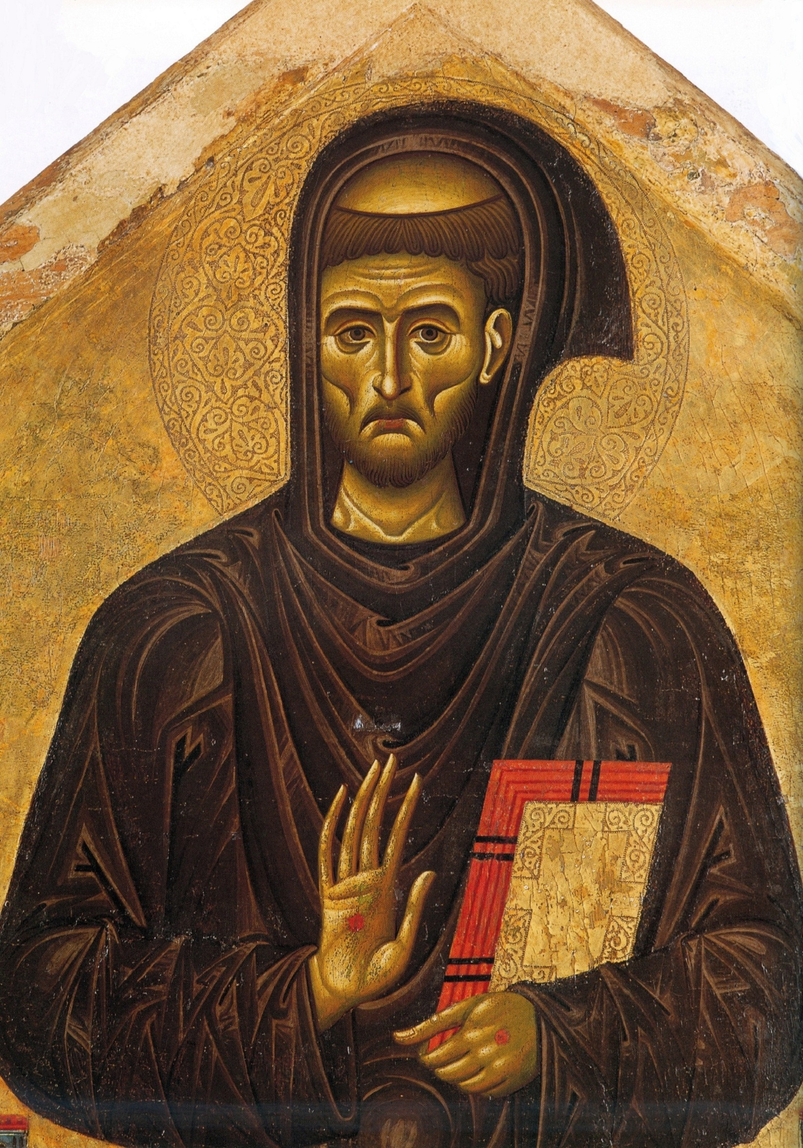 detail